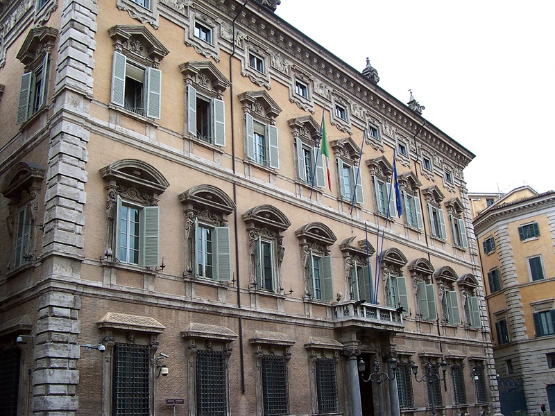 Roma - Palazzo Madama